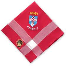 Mouchoir historique de Cholet avec armoiries brodées